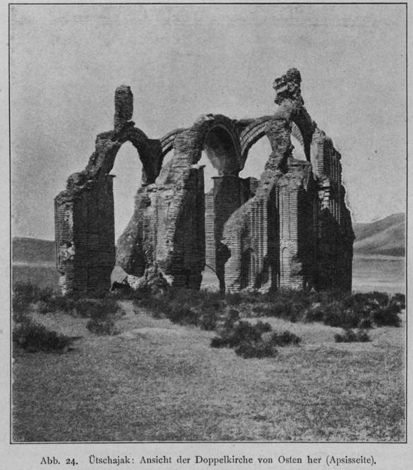 Fotografie der Ruine von Ütschajak, aufgenommen von John Winter Crowfoot im Sommer 1900, veröffentlicht von Josef Stzrygowski in Kleinasien, ein Neuland der Kunstgeschichte, Leipzig 1903, S. 32